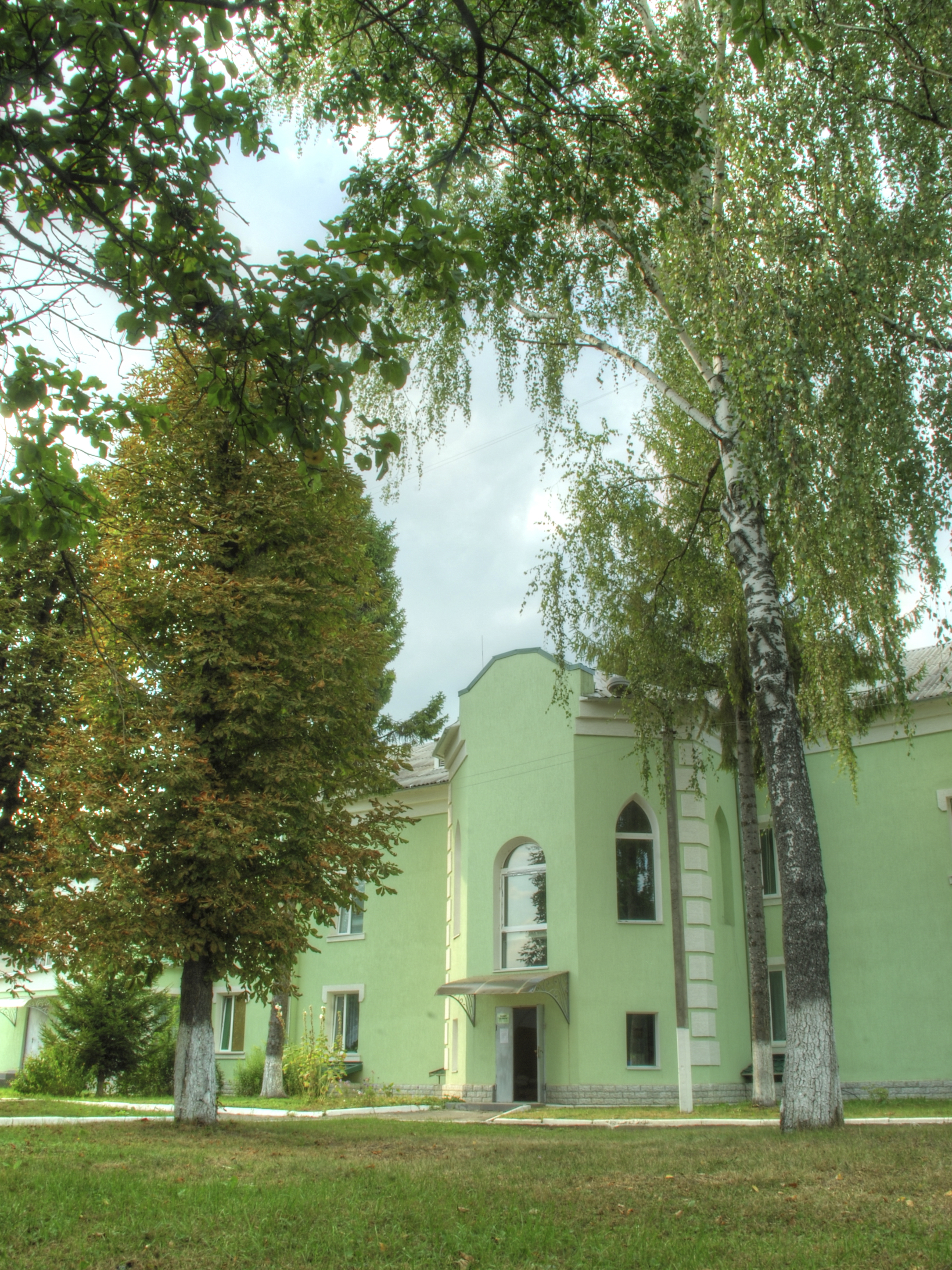 Особняк поміщика В.Ф.Раціборовського, Деражня, вул. Подільська, 1